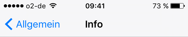 Status-und Menüleiste in iOS 7